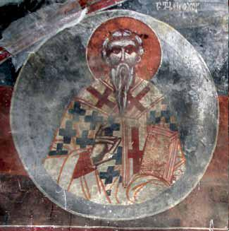 Фреска на Св. Прохор (Охридски архиепископ) во Црквата „Св. Ѓорѓи“ во охридското село Врбјани